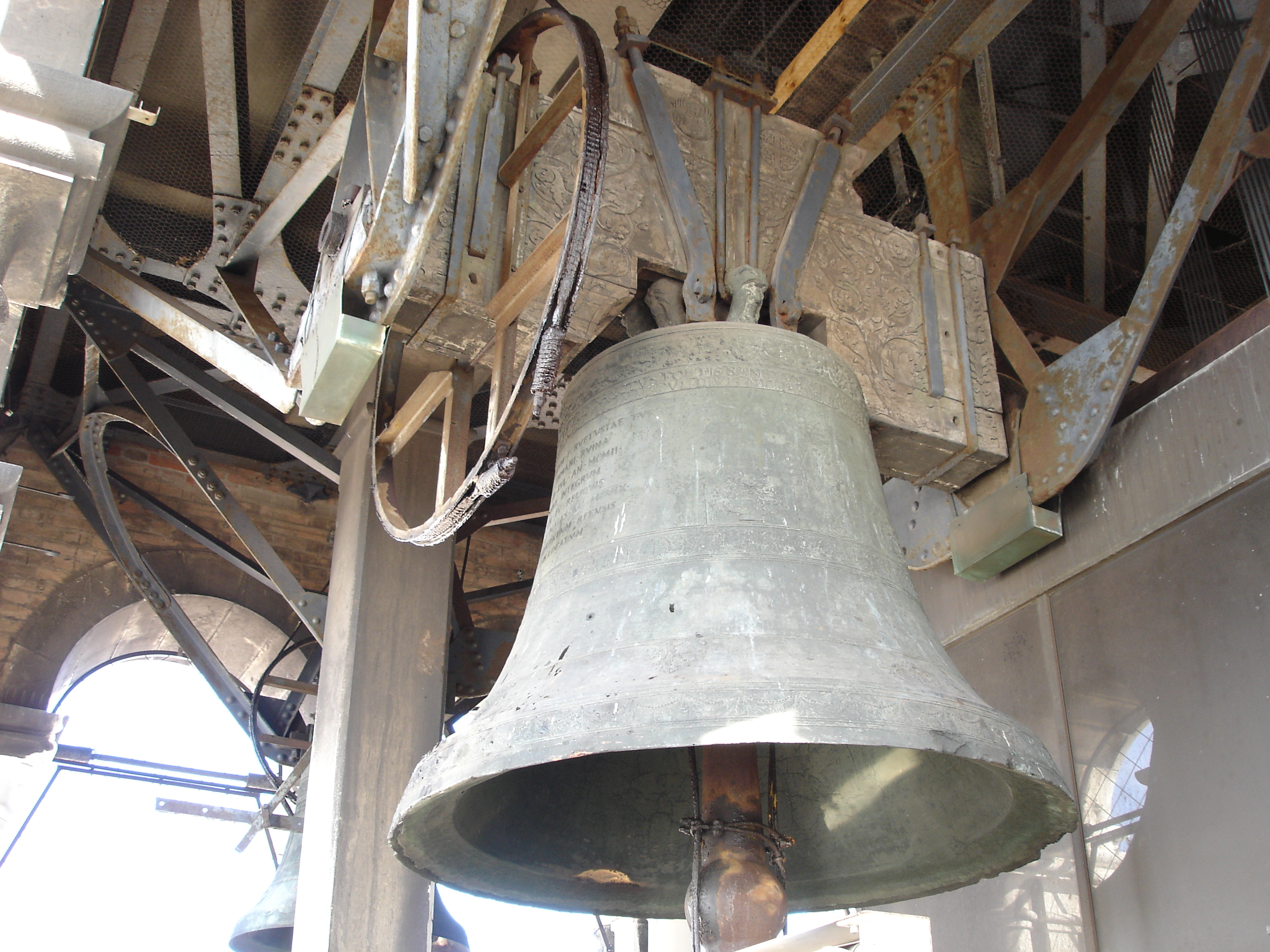 nota La2 diametro 1,800 m peso 3.625 kg